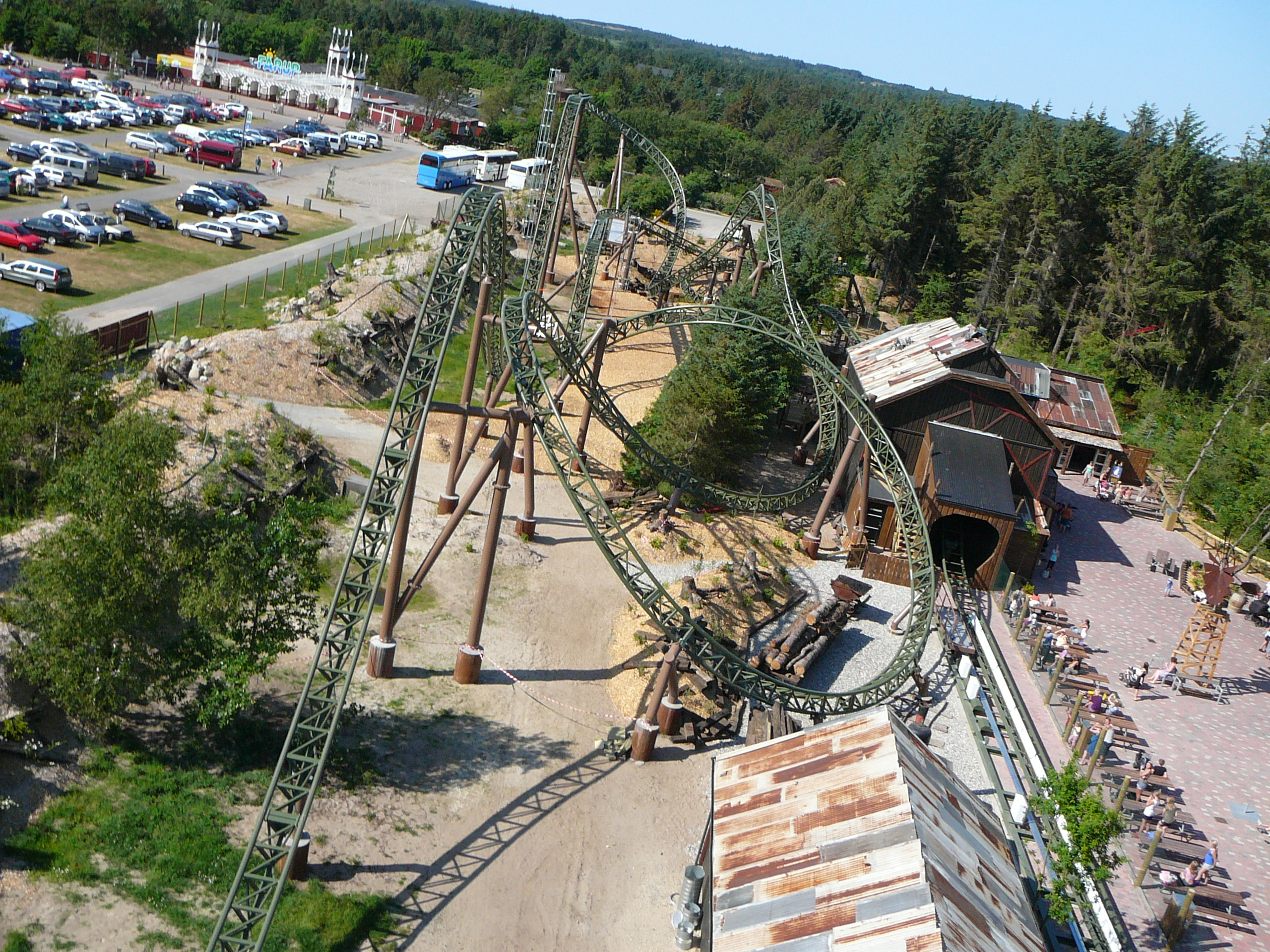 Gerstlauer Launch Coaster (Lynet - Farup Sommerland)